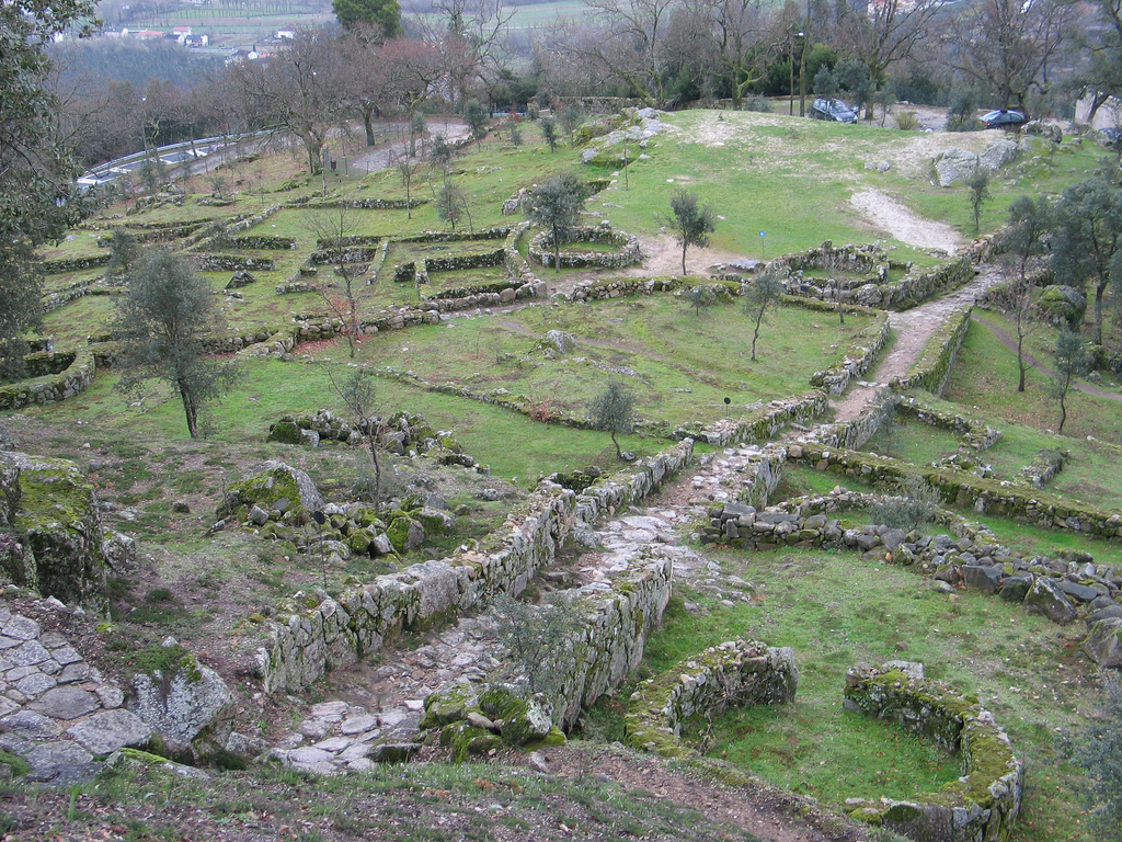 Citânia de Briteiros, Guimarães, Portugal